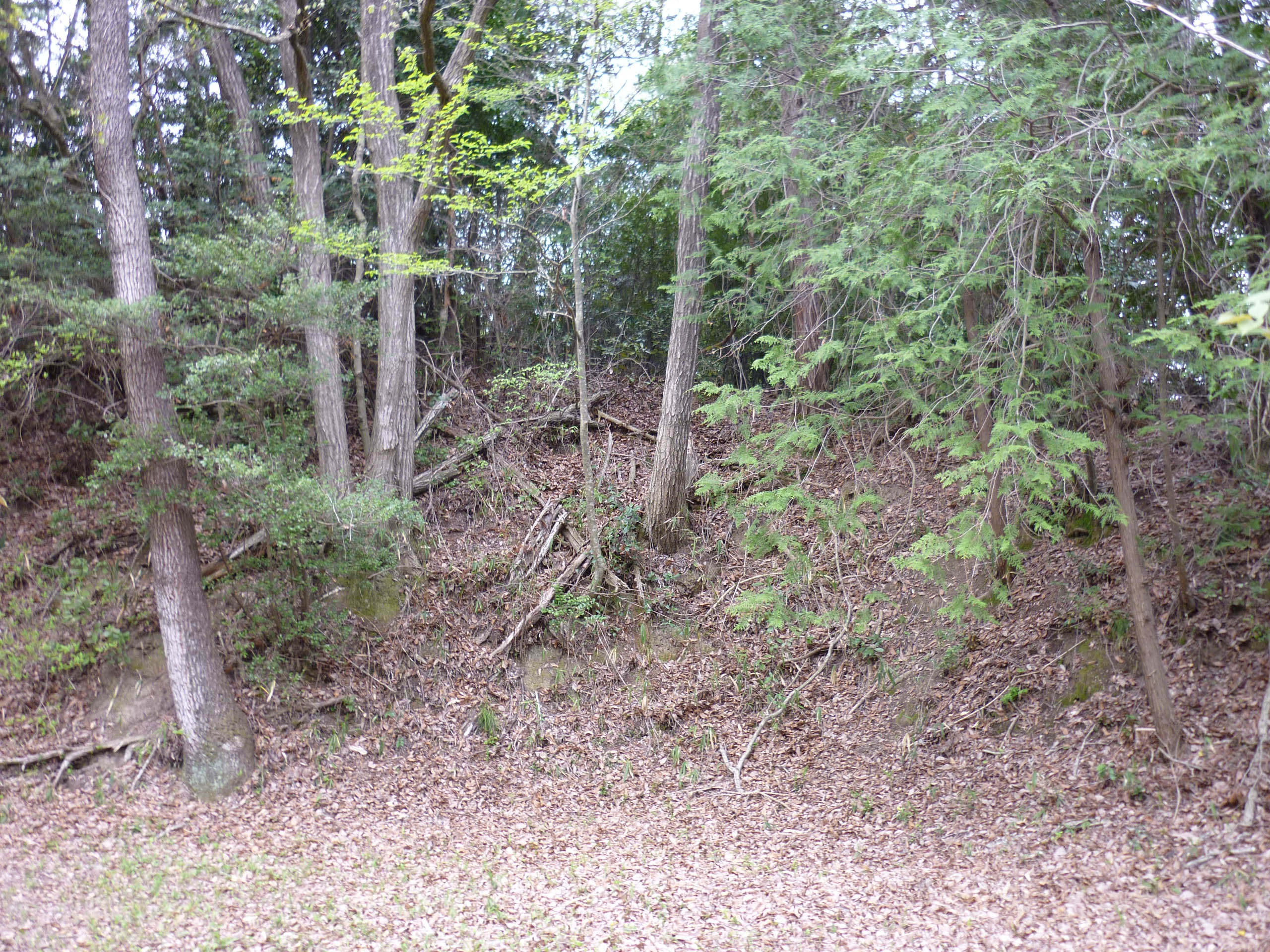 土塁跡